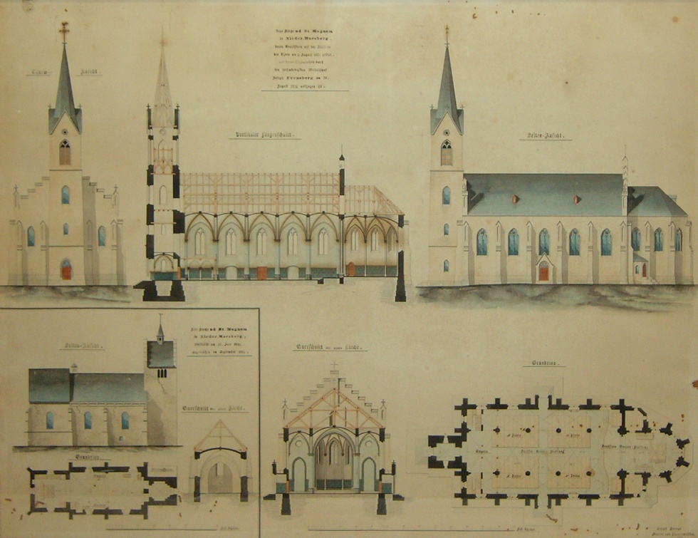 Pläne der neuen Magnuskirche; Turmansicht, Längsschnitt, Seitenansicht, Querschnitt und Grundriss der neuen Magnuskirche (Grundsteinlegung 3. Aug. 1853, Consecrierung 21. Aug. 1856); Links unten Seitenansicht, Grundriss und Querschnitt der im Sept. 1852 abgebrochenen alten Magnuskirche Erstellt von Joseph Prange Maurer und Zimmermeister 3/65 Aquarellierte Zeichnung; Papier, 77 x 63 cm; Heimatmuseum der Stadt Marsberg